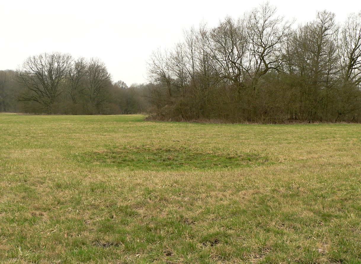 Bombentrichter im Hermann Löns Park in Hannover